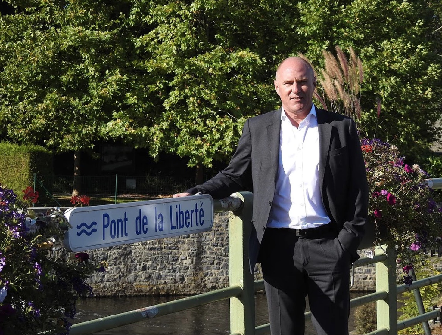 Photo de André Pierre Puget sur le pont de la Liberté